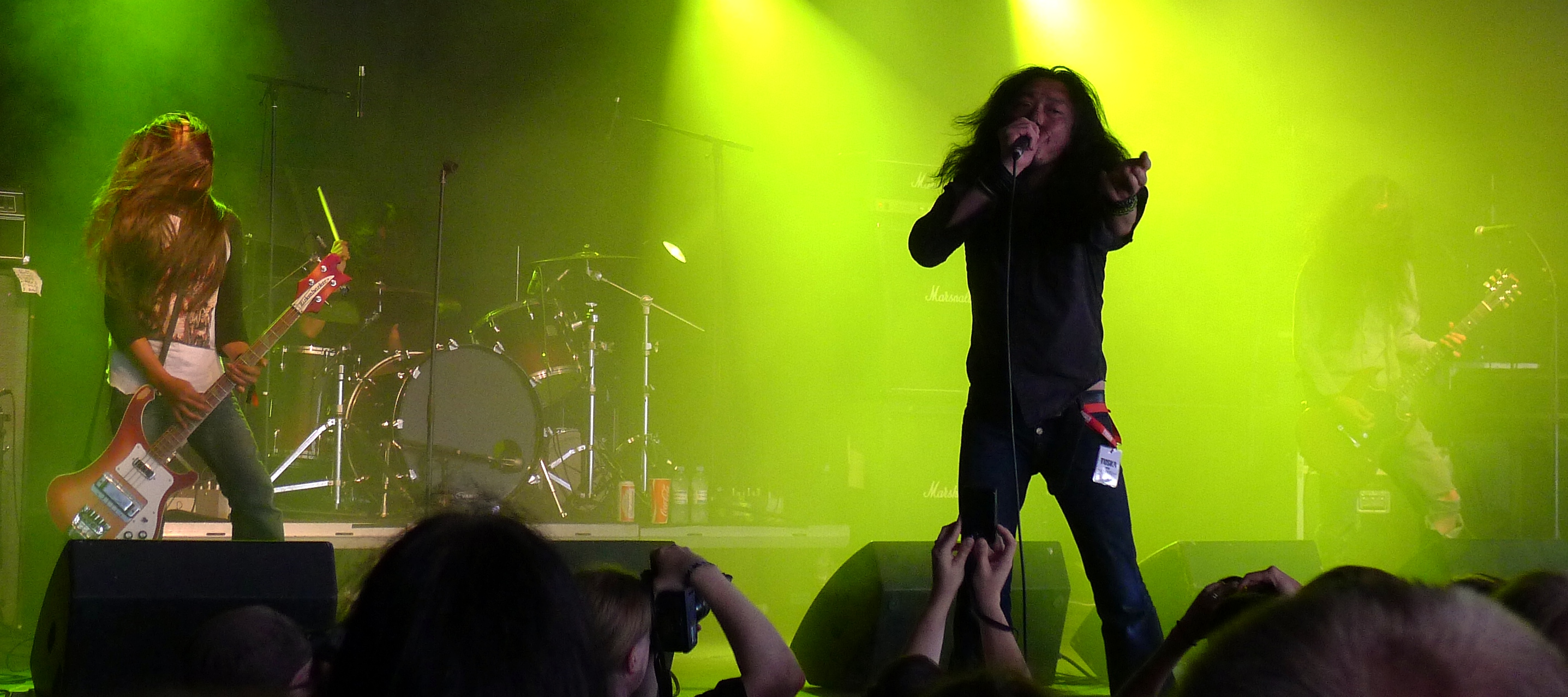 Church of Misery live am Tuska Open Air 2011